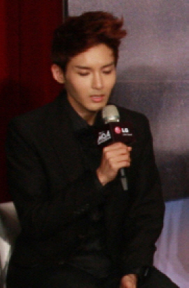 LG전자는 26일 저녁 대만 카오슝市에 위치한 '카오슝 아레나(Kaohsiung Arena)'에서 1만3천여 명의 관객이 운집한 가운데 열린 CJ주관 'M Live 콘서트'를 공식 후원했다. 콘서트에 앞서 공연장 인근 '샤또 데 신(CHATEAU de CHINE)' 호텔에서 LG 스마트폰 사용 고객 200명을 특별 초청해 'LG 옵티머스 슈퍼주니어 팬미팅' 행사를 개최했다.